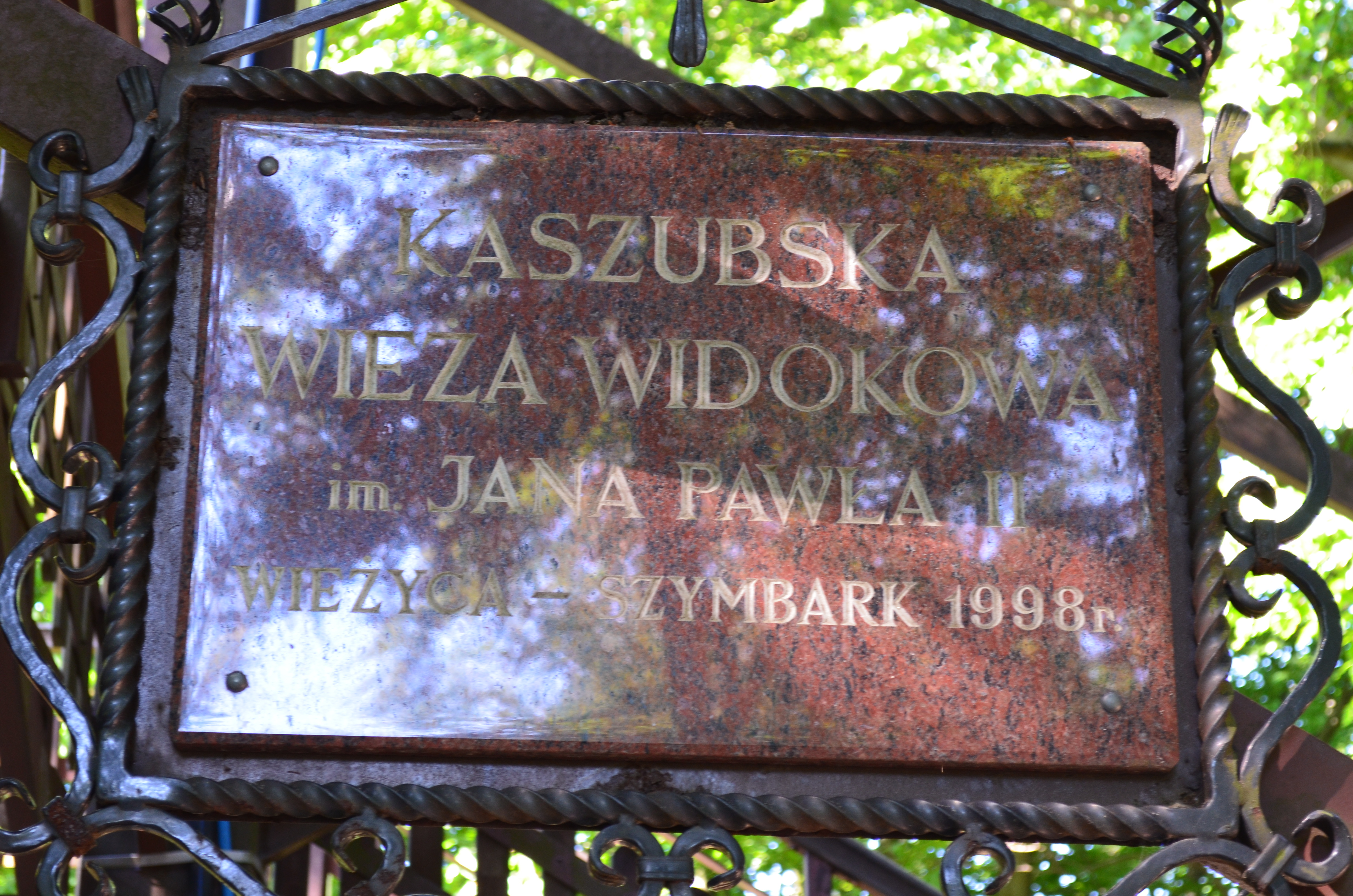 Tablica Kaszubskiej Wieży Widokowej im. Jana Pawła II na Wierzycy